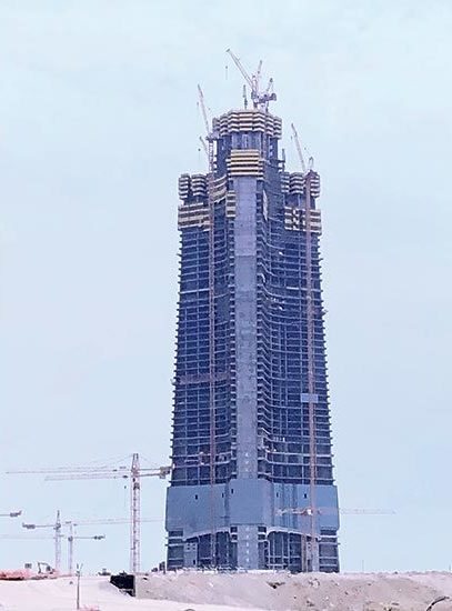 En construccion